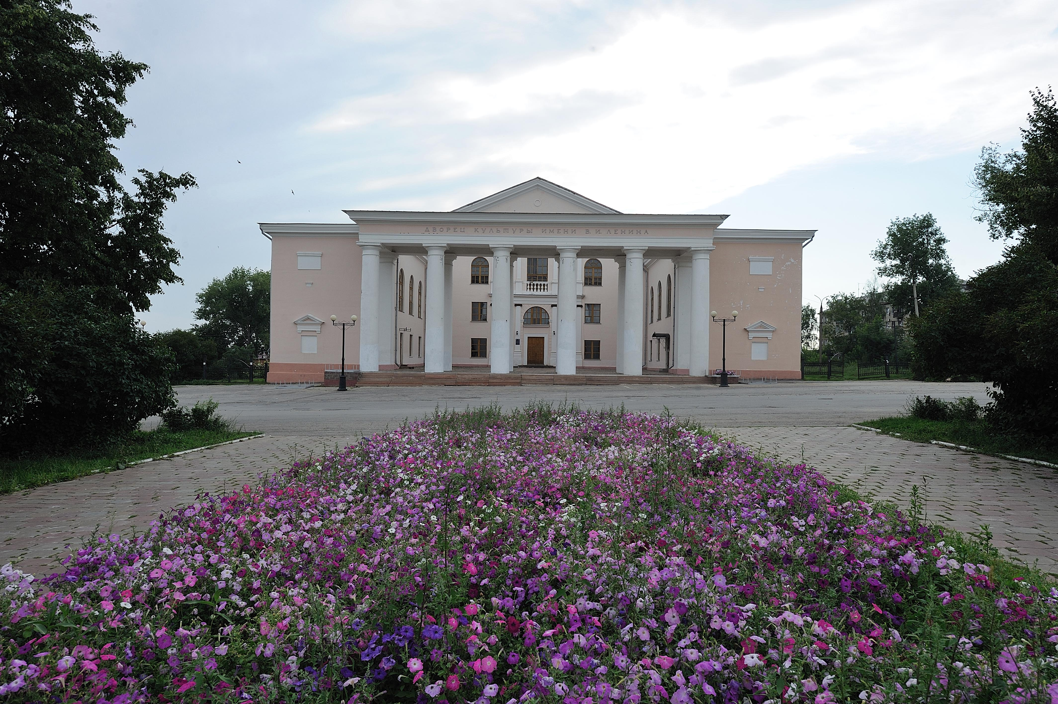 Дворец культуры города Скопин